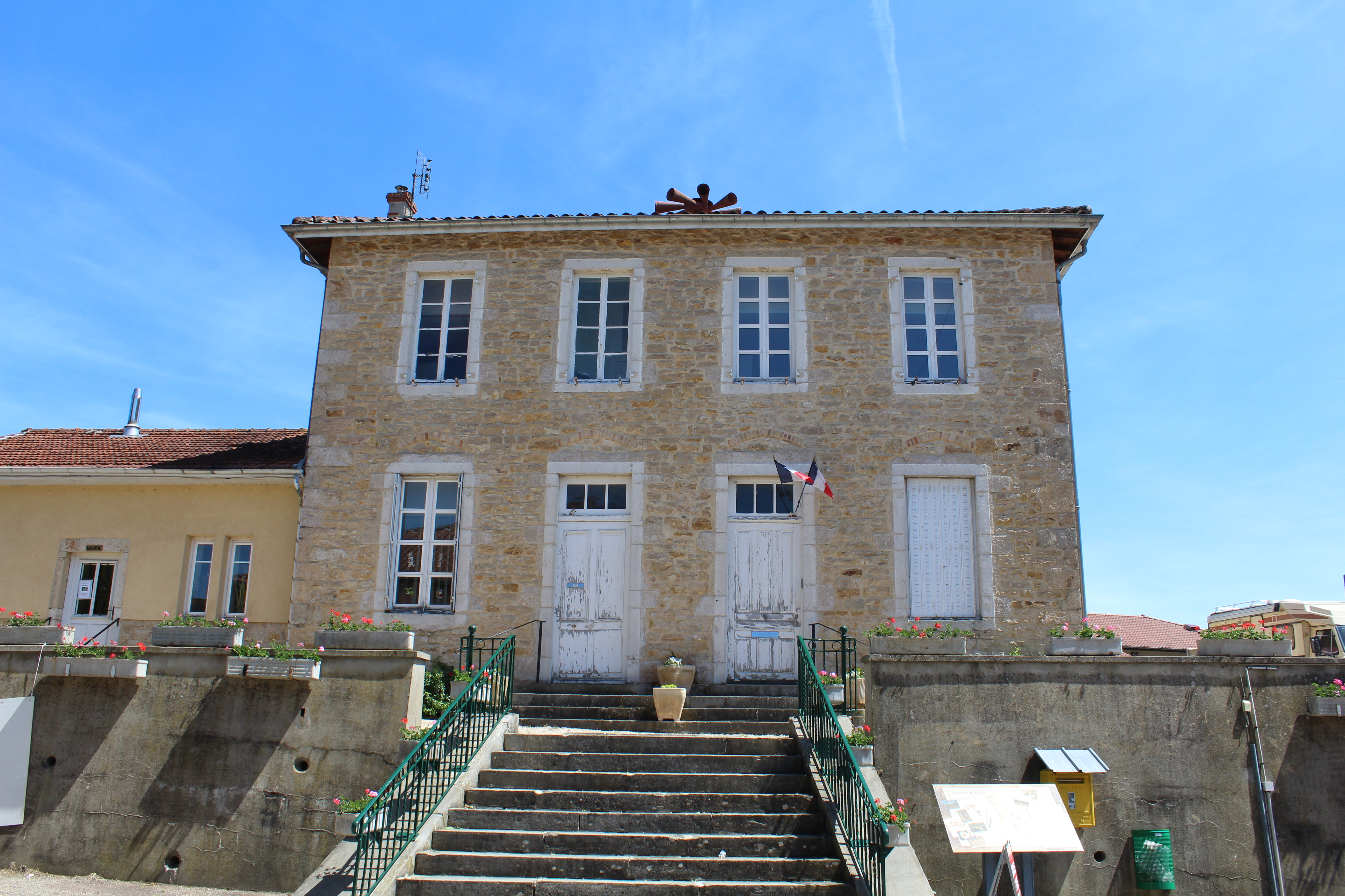 Mairie de Pirajoux.